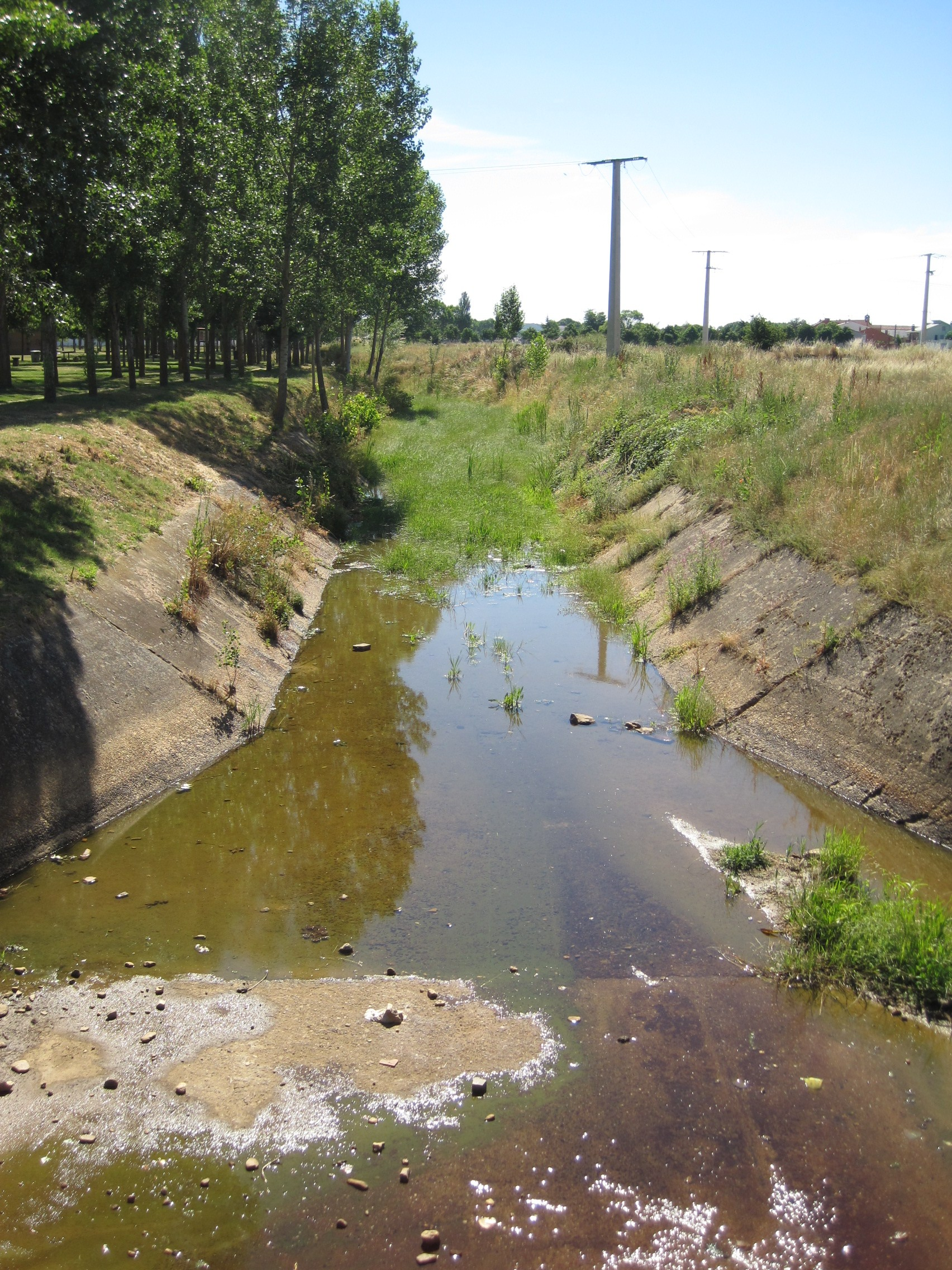 El río Jerga a su paso por Astorga (León, España).